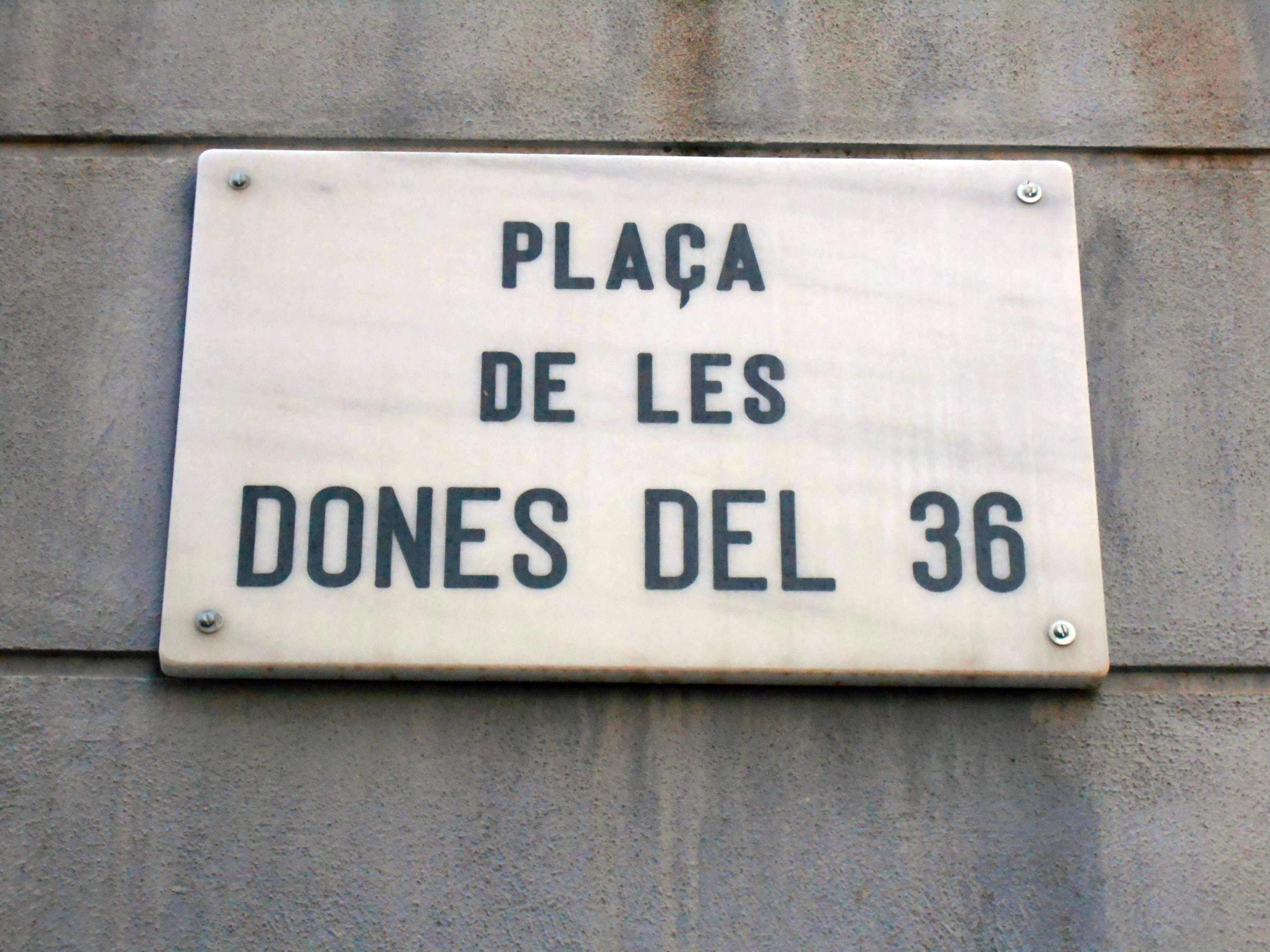 Plaza de las Mujeres del 36.